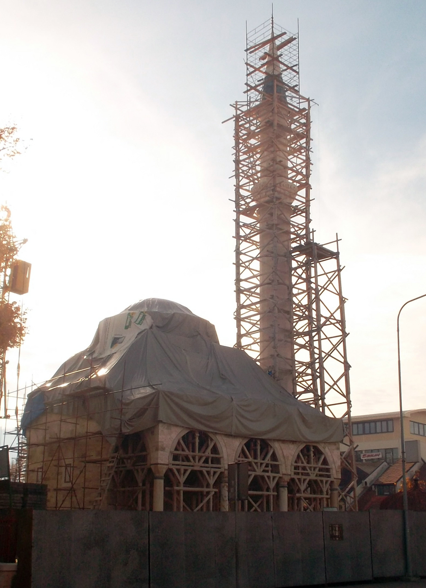 Ферхадија, новембар 2012.